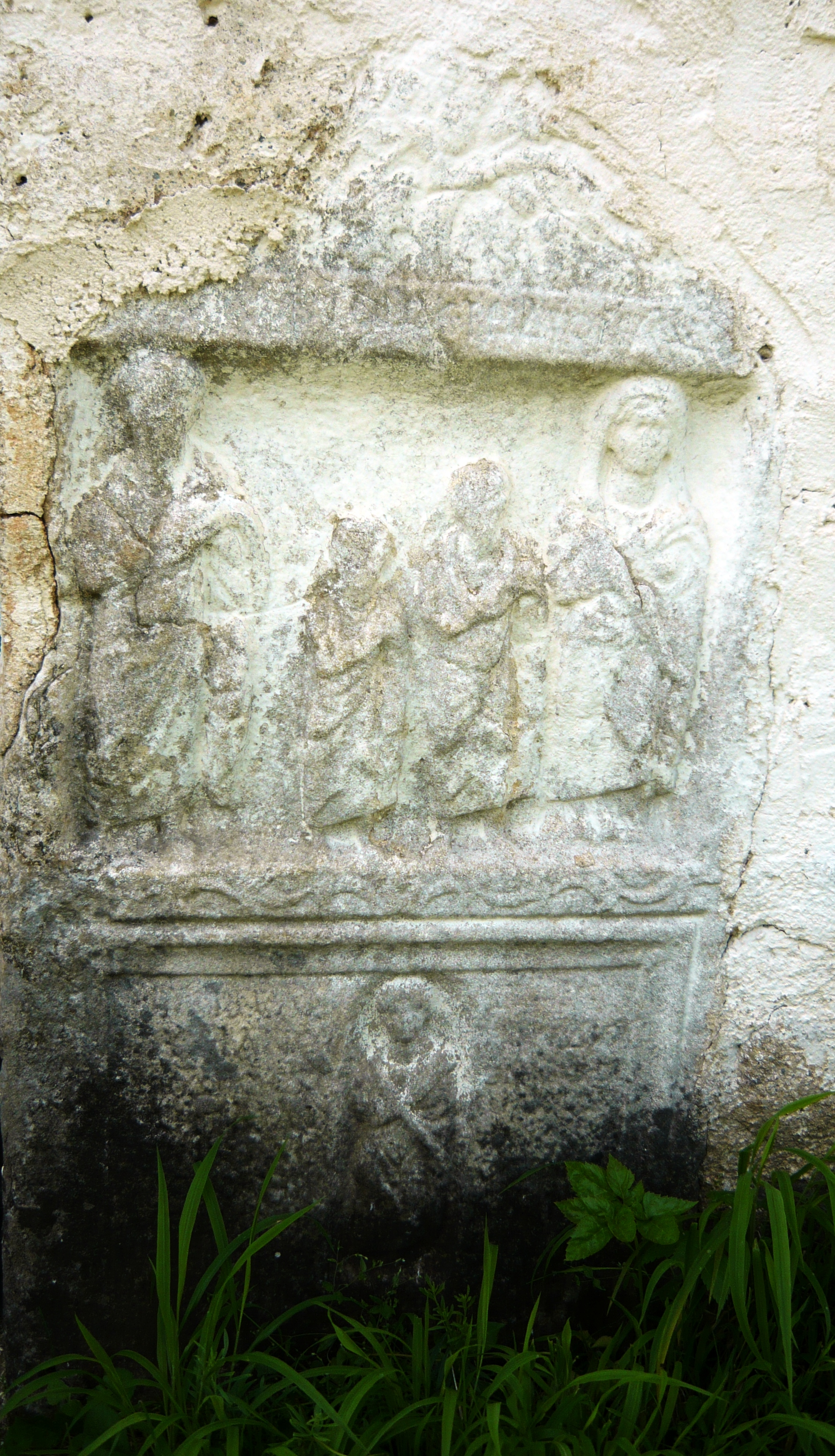 Секундарно употребен антички надгробен споменик во северниот ѕид на црквата Св. Атанасие во Слоештица.